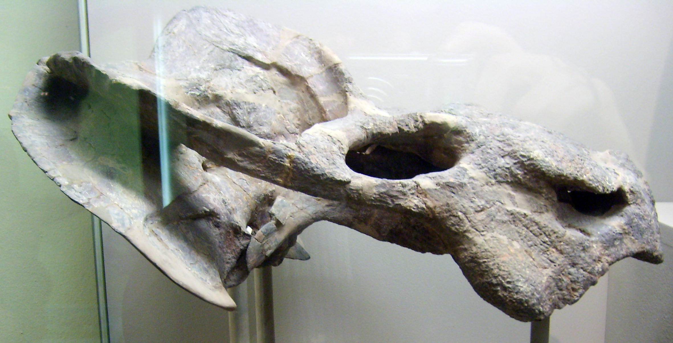 Kannemeyeria simocephalus skull at the Museum für Naturkunde, Berlin.